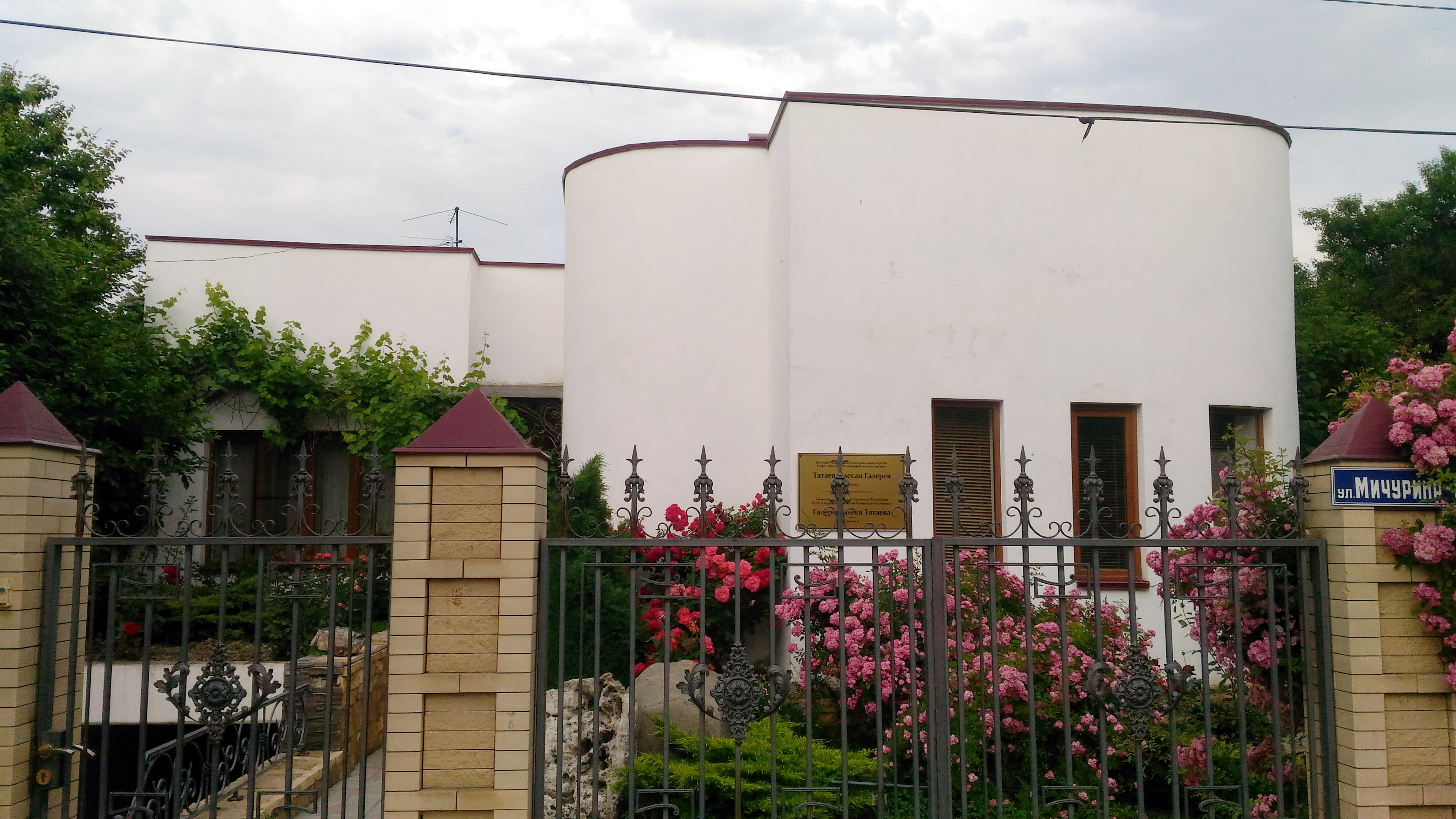 Галерея Илеса Татаева в Грозном